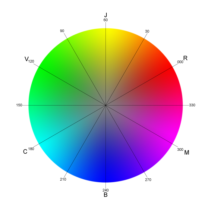 Cercle chromatique avec les degrés des espaces TSL / TSV par pas de 30